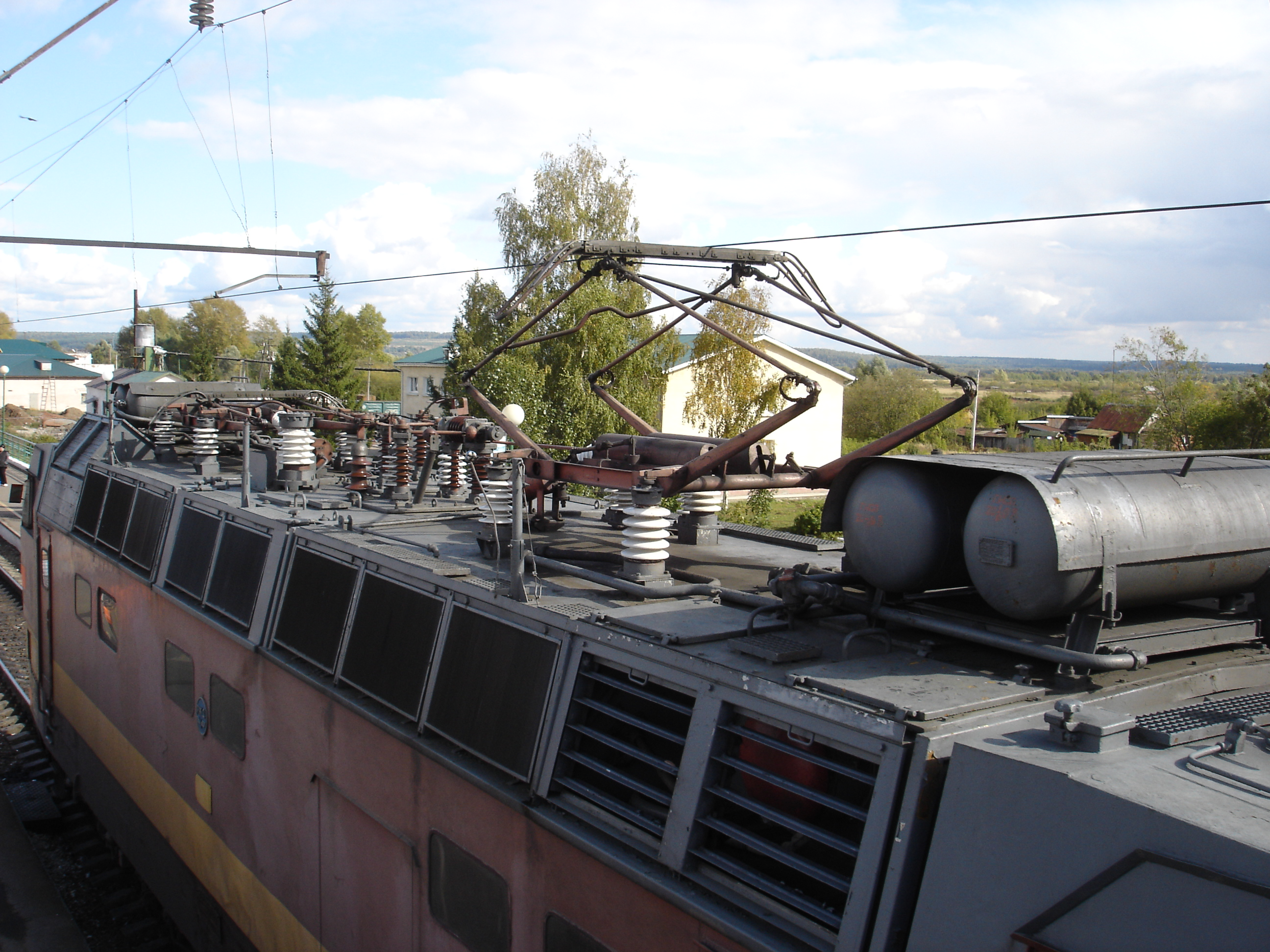 Агрыз - административный центр Агрызского района Татарстана. Железнодорожная станция Агрыз Горьковской ЖД. Пассажирский магистральный электровоз переменного тока ЧС4, № 284 прибывает на станцию с поездом. Вид на крышу локомотива.